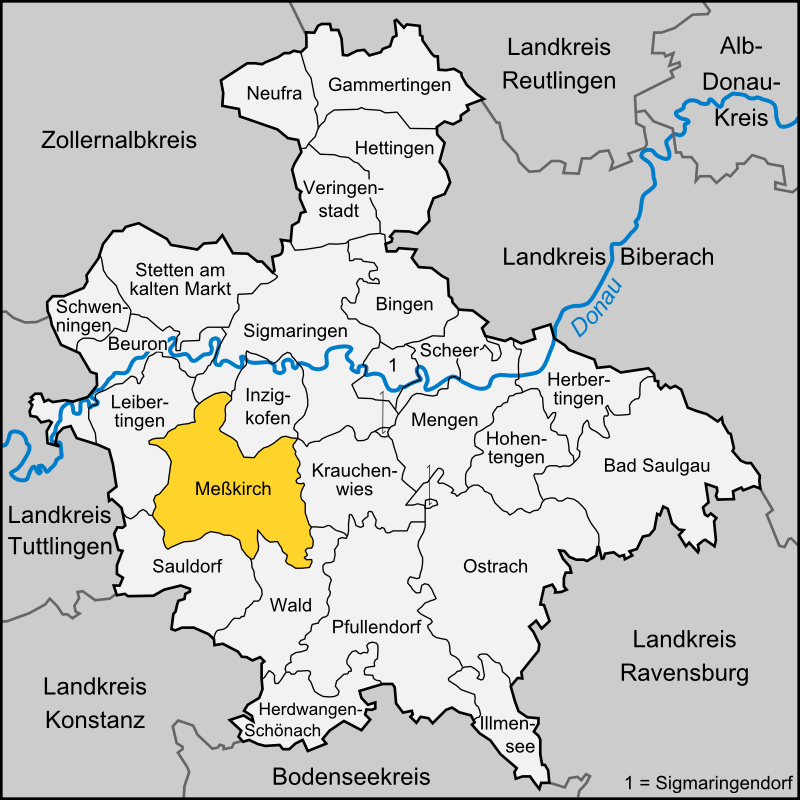 Karte der Stadt Meßkirch im Landkreis Sigmaringen